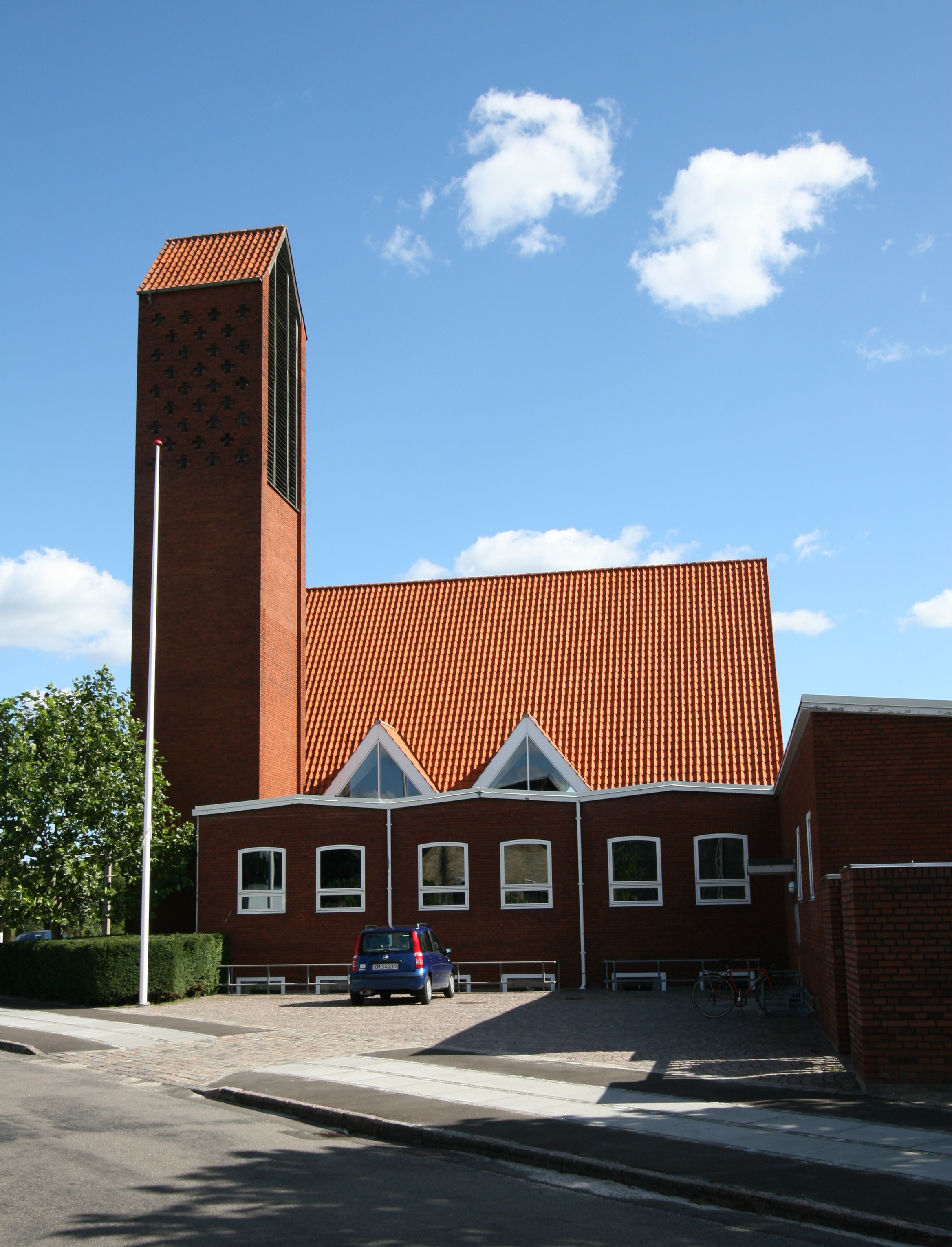 Sundkirken, Amager, Copenhagen, Denmark. Sundkirken